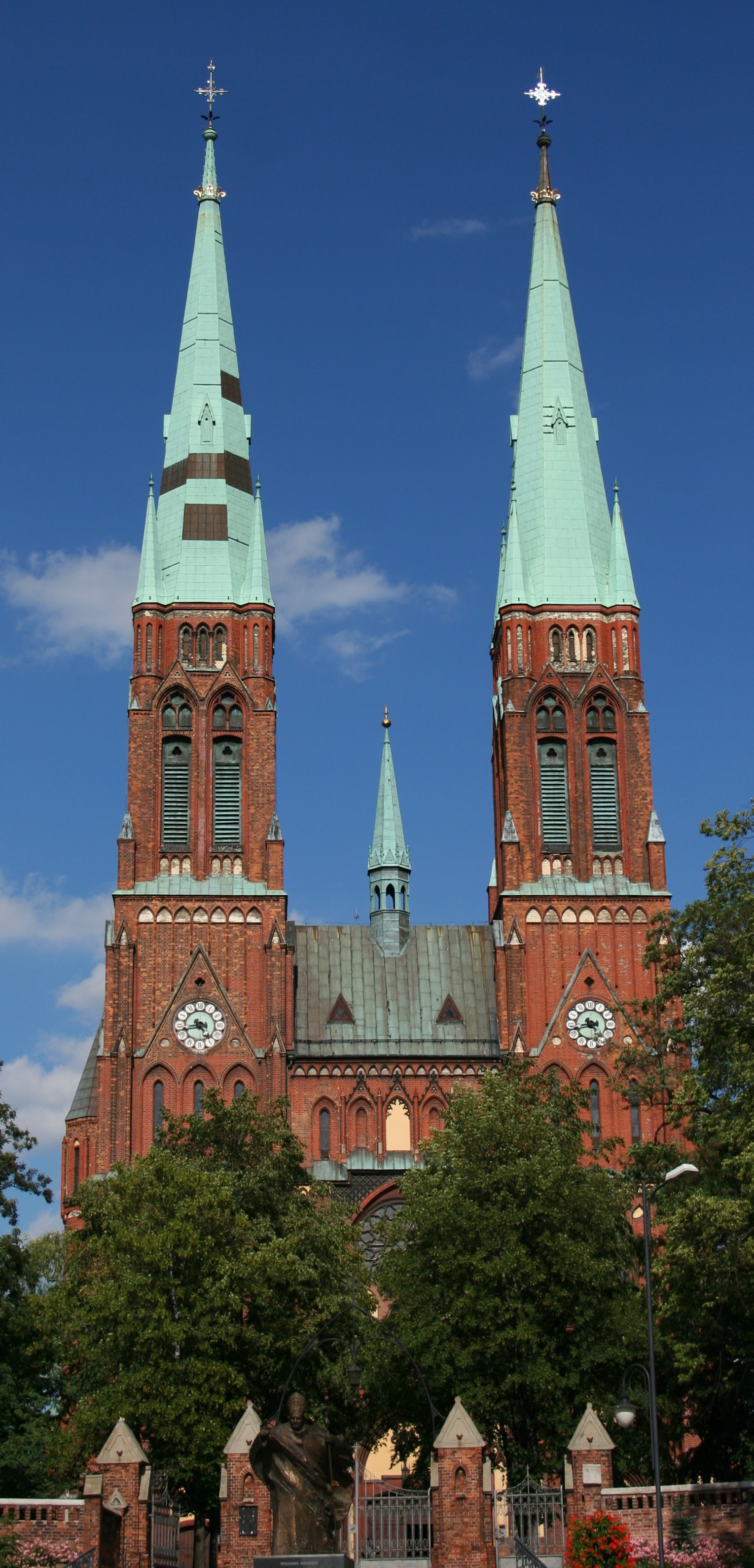 Bazylika św. Antoniego w Rybniku